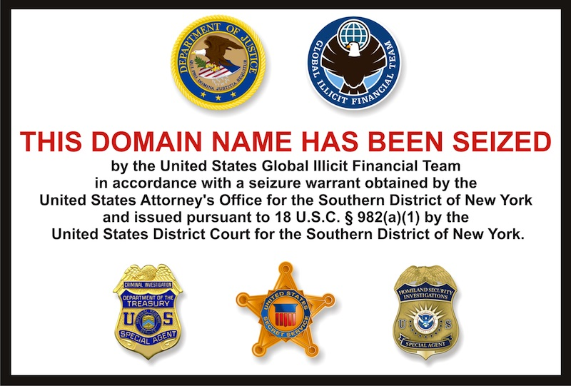 Gesperrte Website von LR durch US Justiz